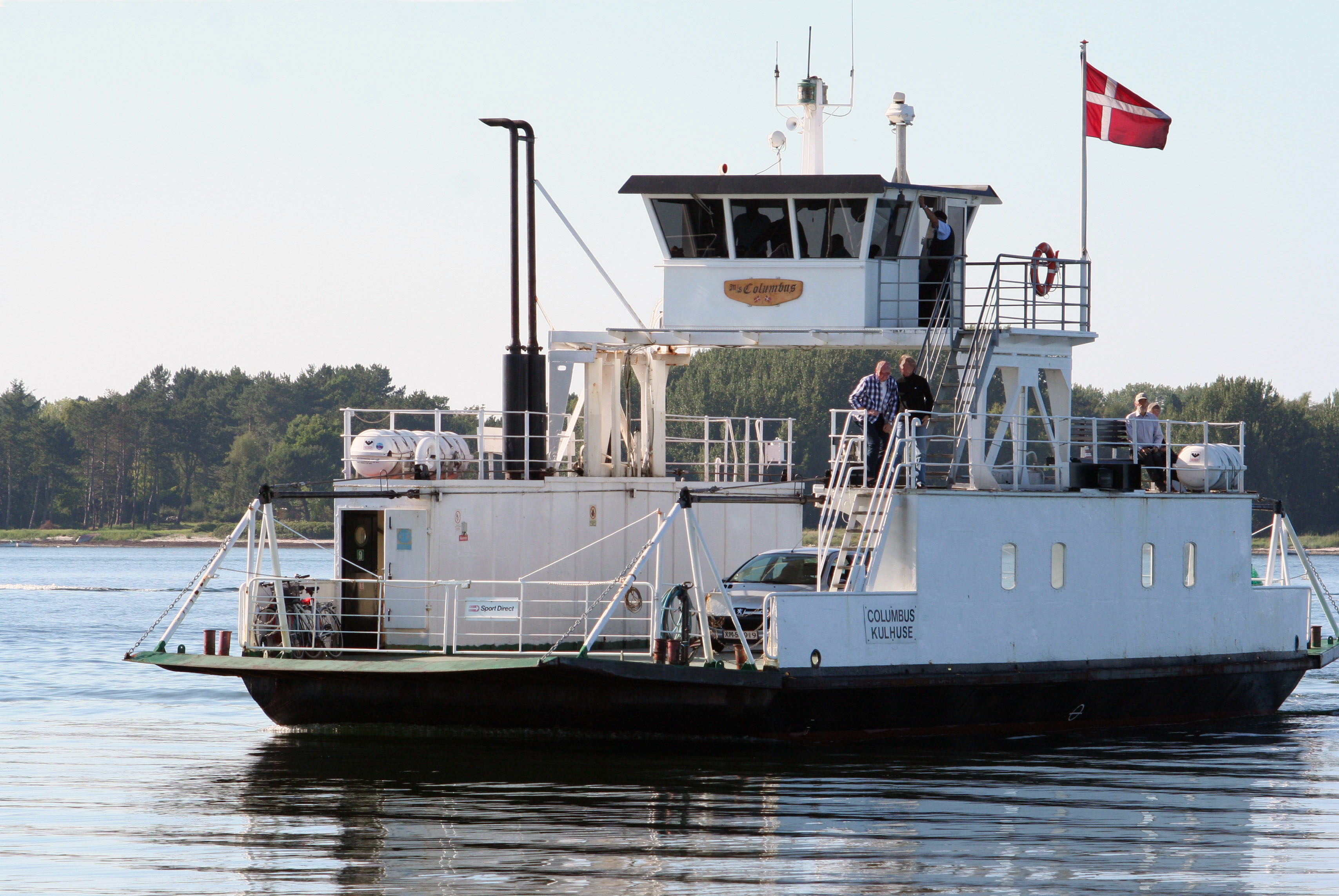 Færgen MF Columbus, Kulhuse